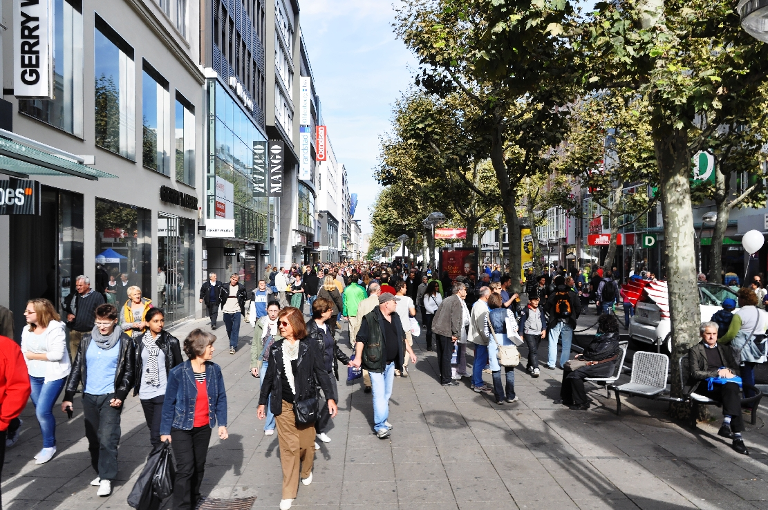 Tag der Deutschen Einheit in Stuttgart 2013